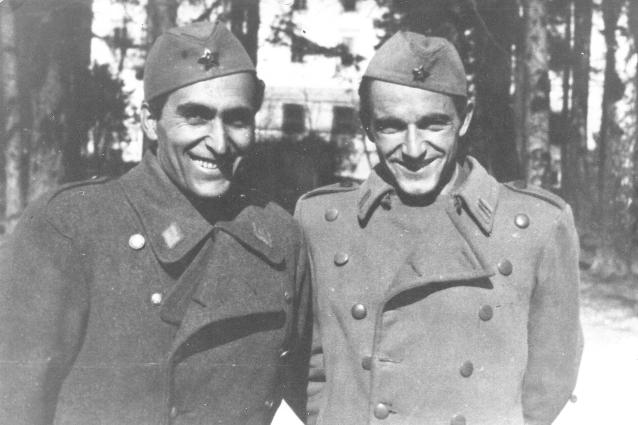 Gajo Vojvodić, comandante della prima brigata proletaria, e Komnen Žugić, commissario politico della stessa brigata